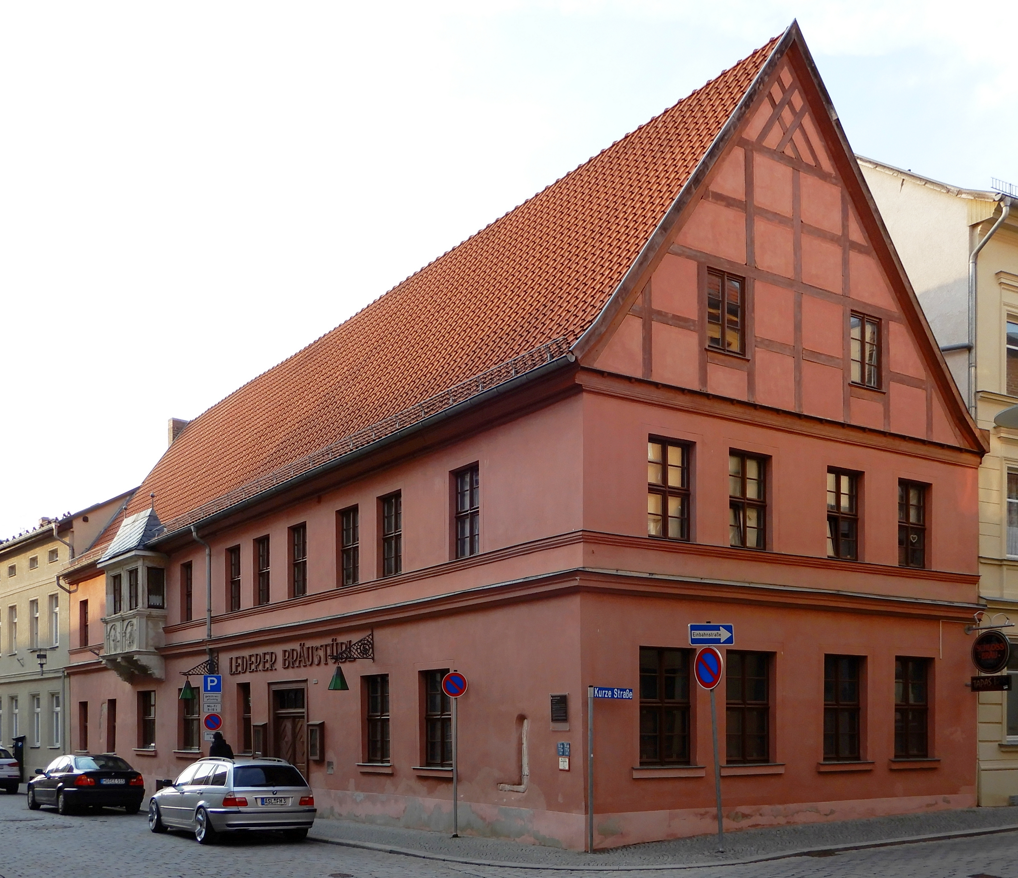 Gebäude Über den Steinen 5a in Aschersleben